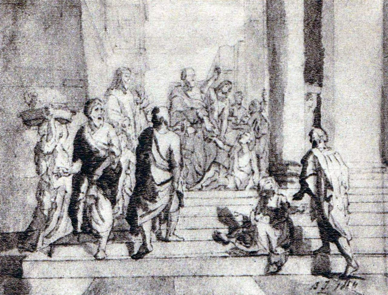 Schita pentru o compozitie